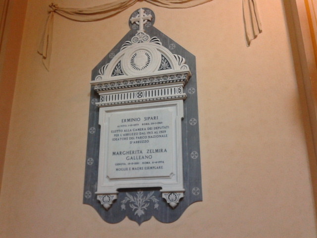 Tomba di Erminio Sipari nella chiesa dell'Addolorata